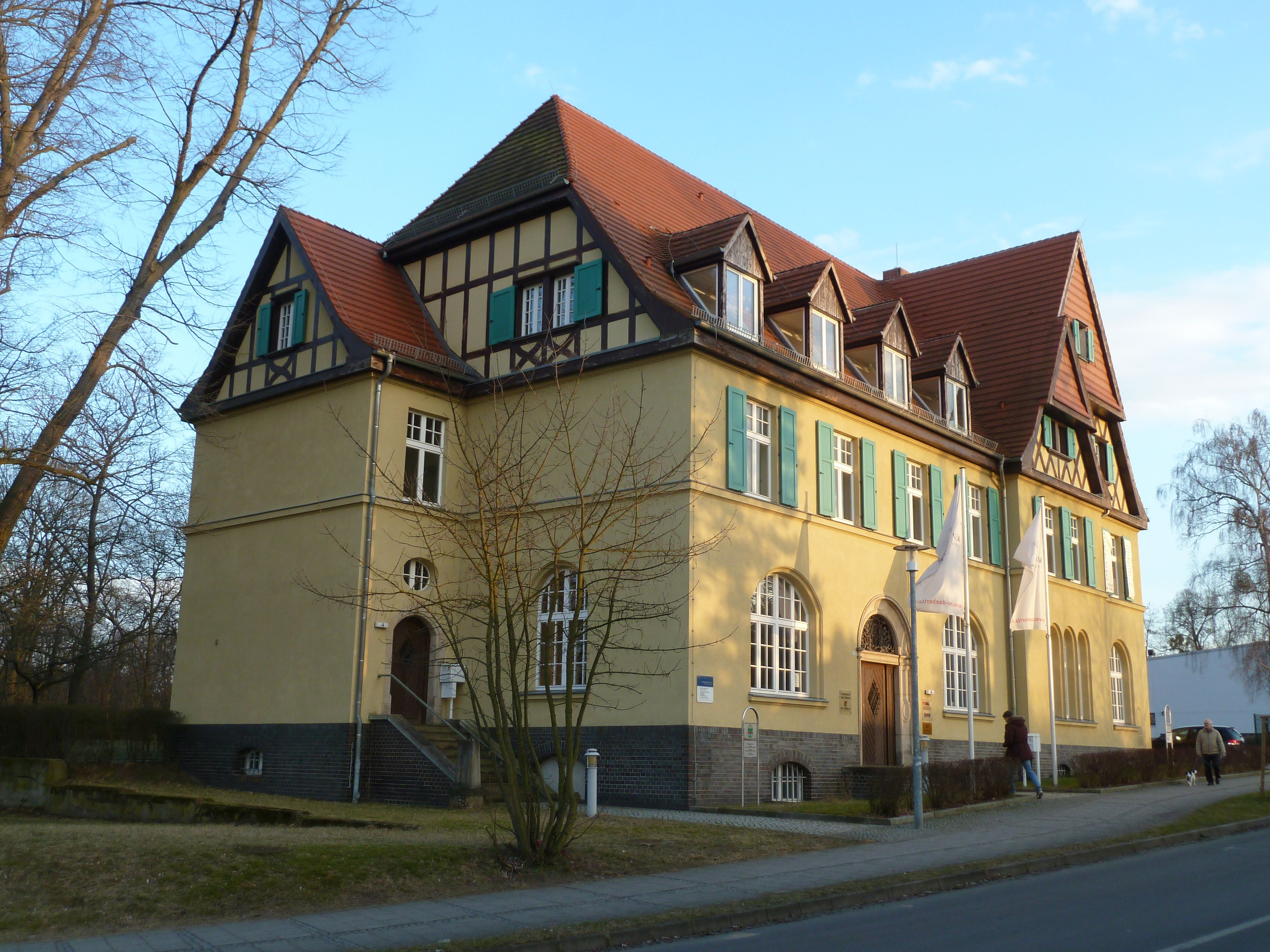 Dallgow, denkmalgeschützte Post,Wilhelmstr 4